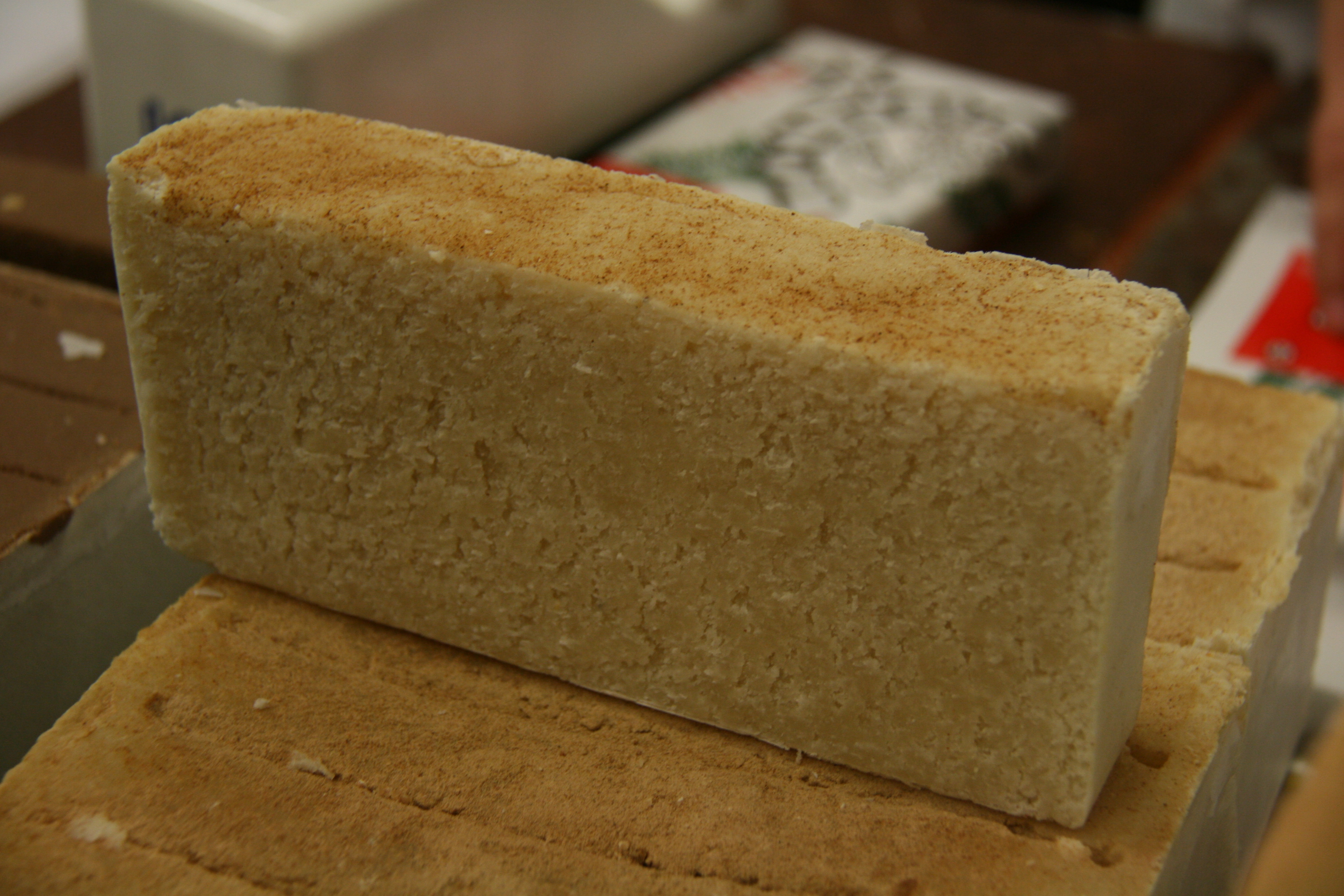 Leche de almendras - Casa Mira